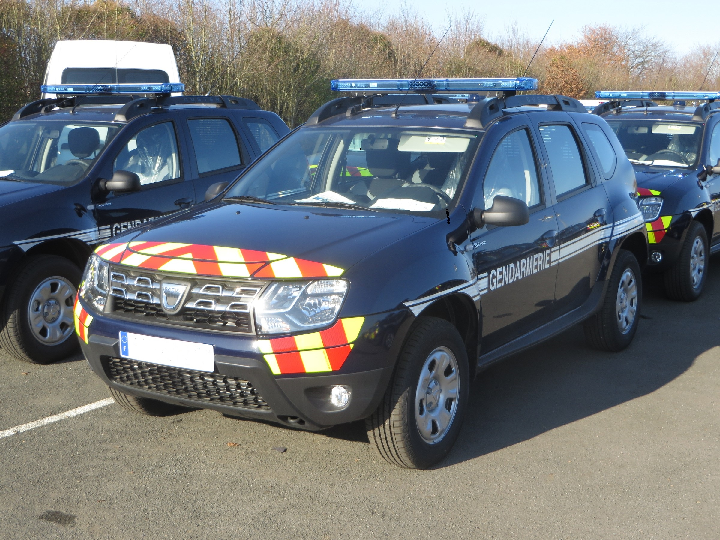 photo Duster Gendarmerie